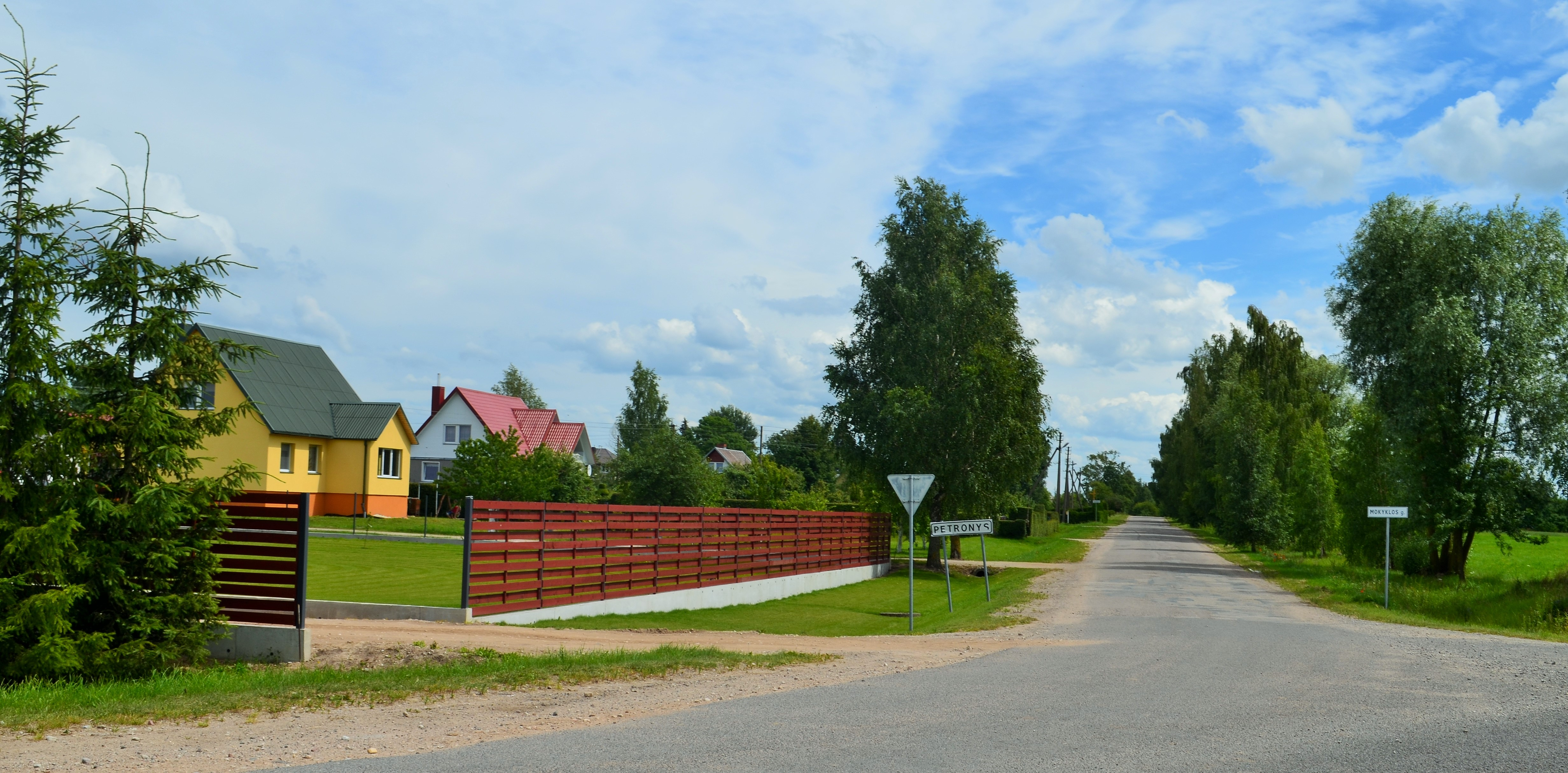 Petronys, Ukmergės raj.